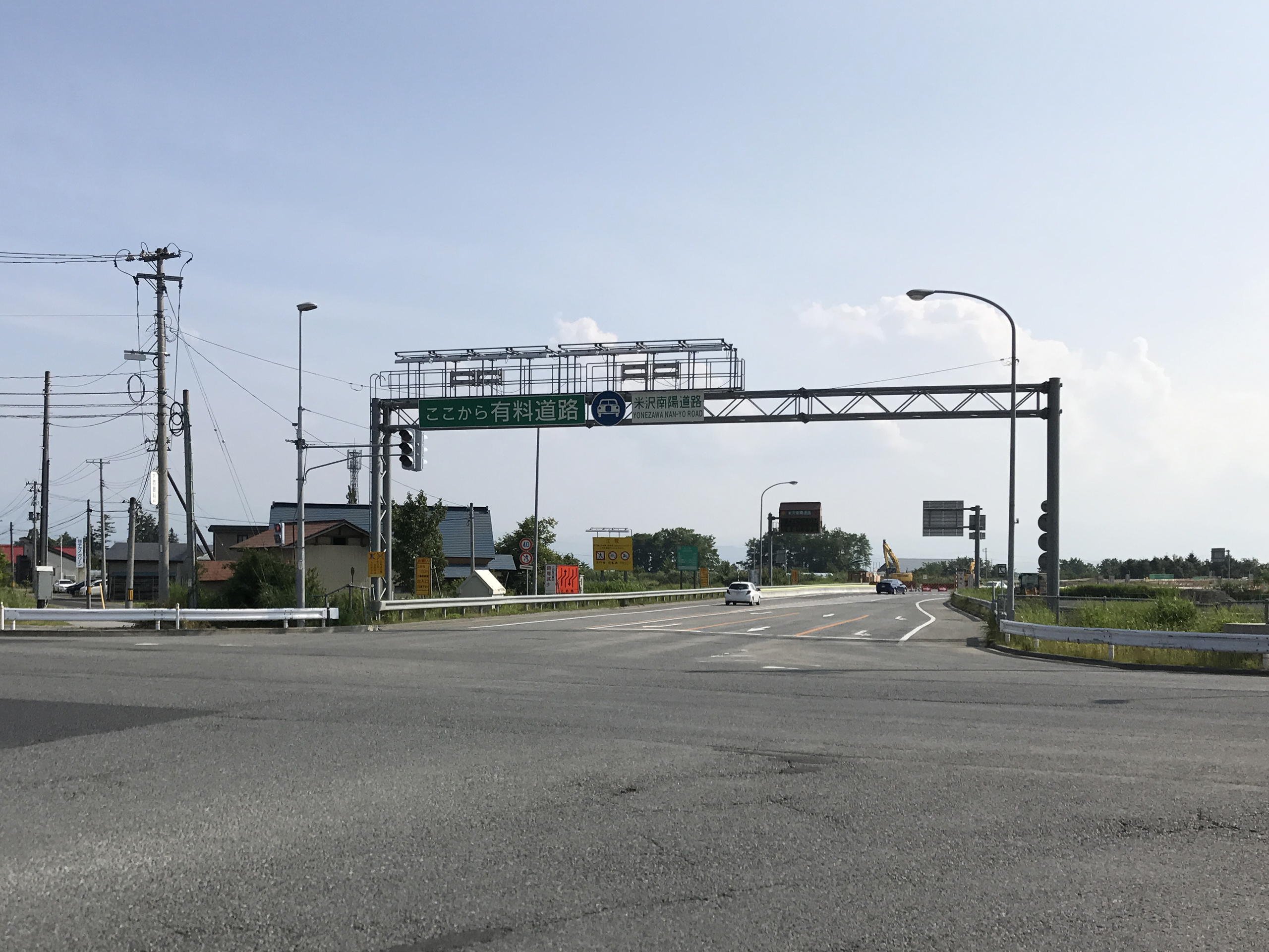 米沢南陽道路 南陽高畠IC出入口